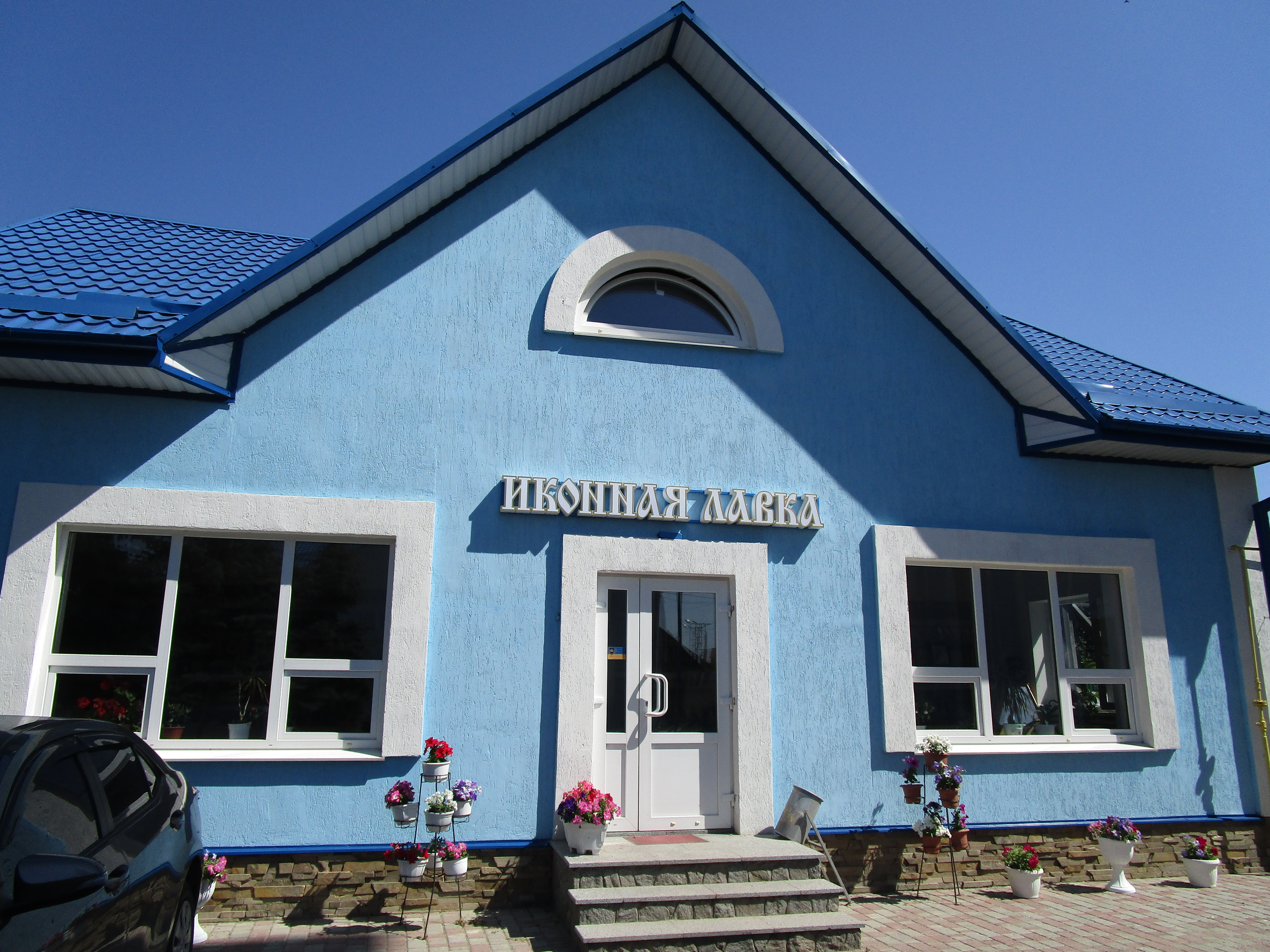 Будівля іконної лавки Храму Різдва Пресвятої Богородиці